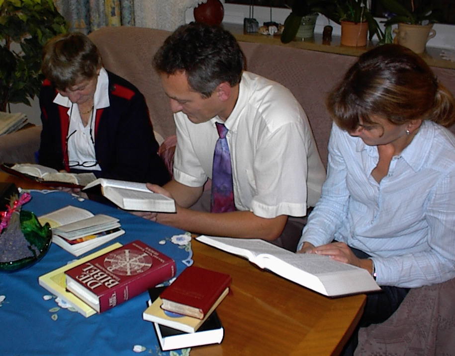 Bibelstudium in einer Kleingruppe